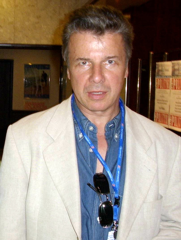 Emilian Kamiński